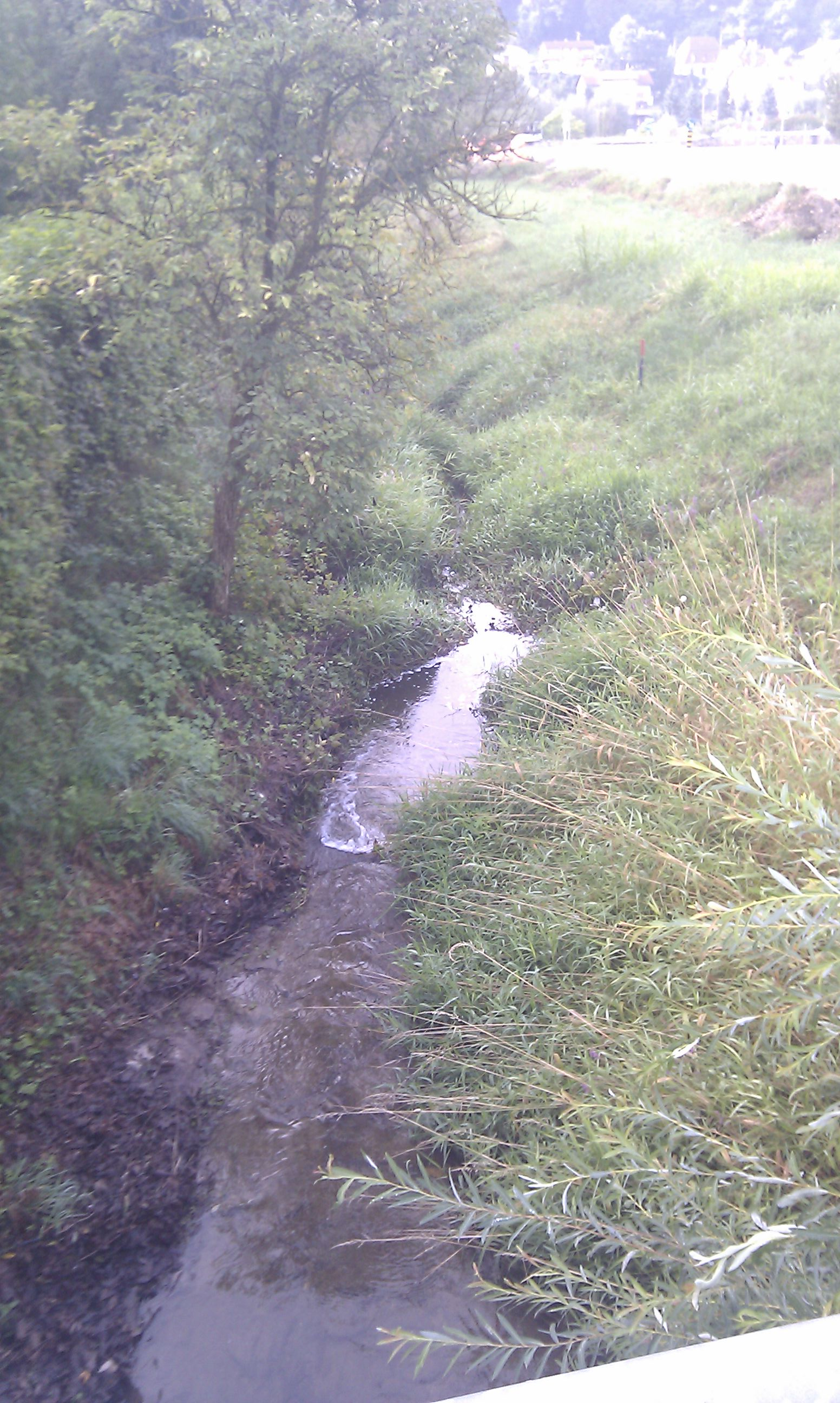 Draganja pri Rogatcu